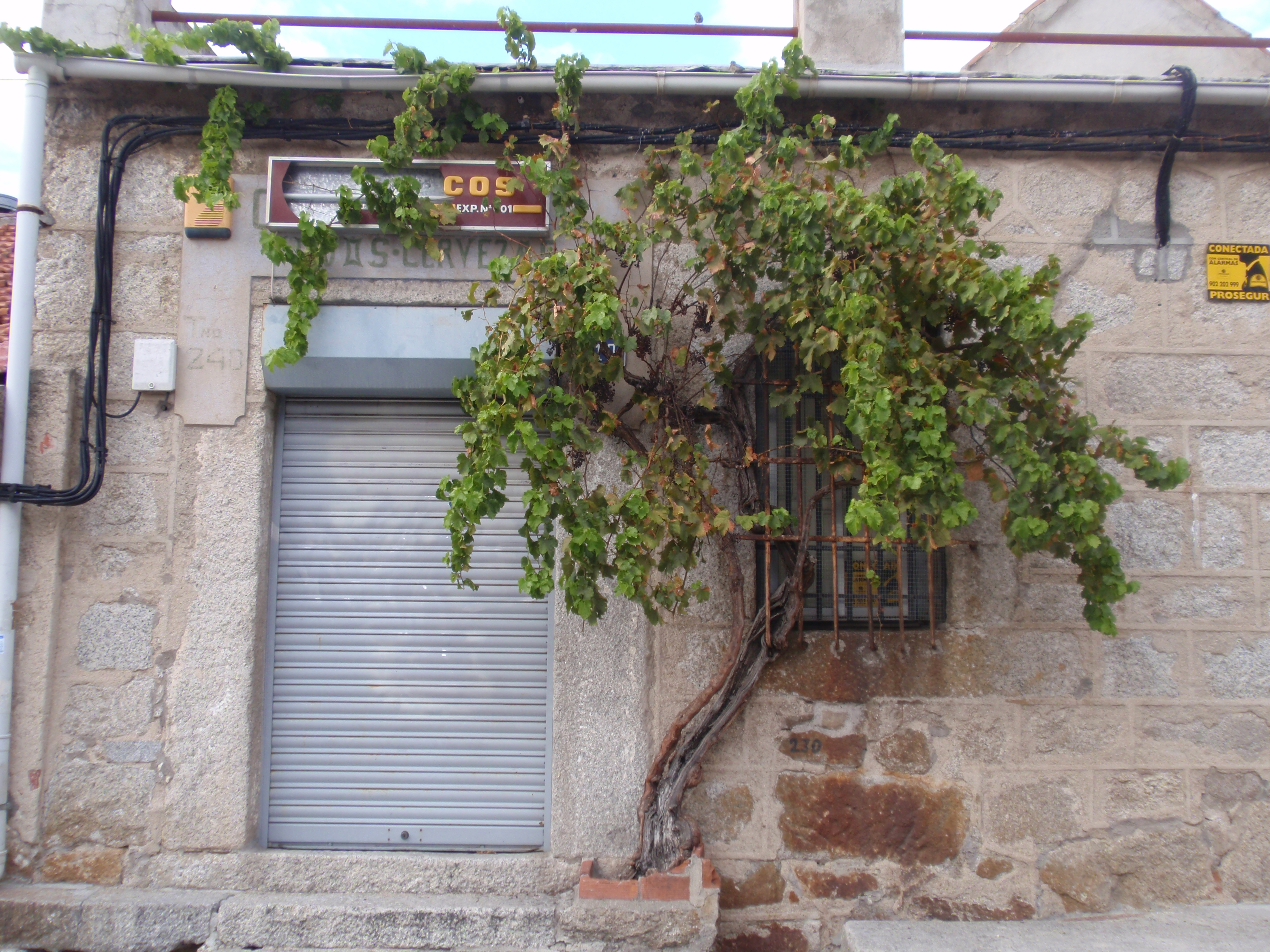 Torrelodones. Antiguo estanco, situado en la Plaza de la Constitución.